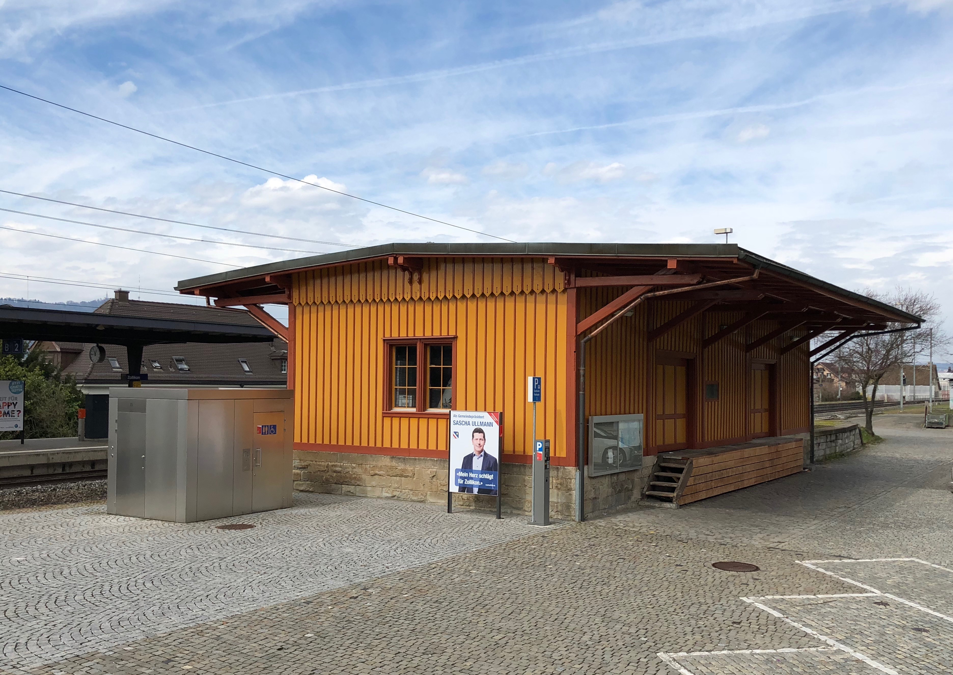 Güterschuppen Bahnhof Zollikon